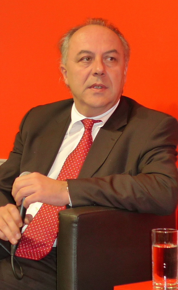 Matthias Machnig